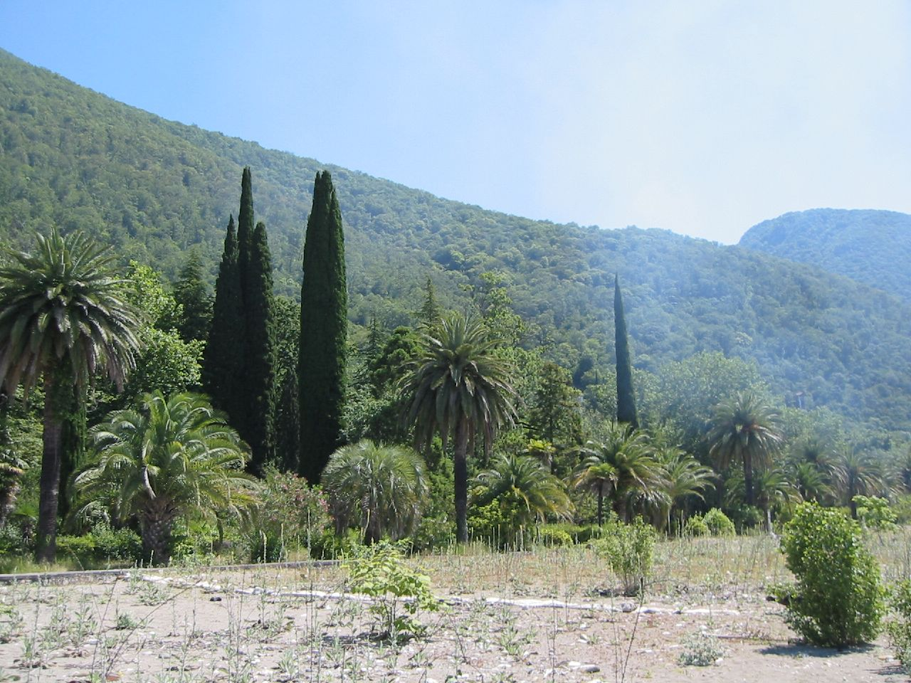 Gagra subtropical landscape